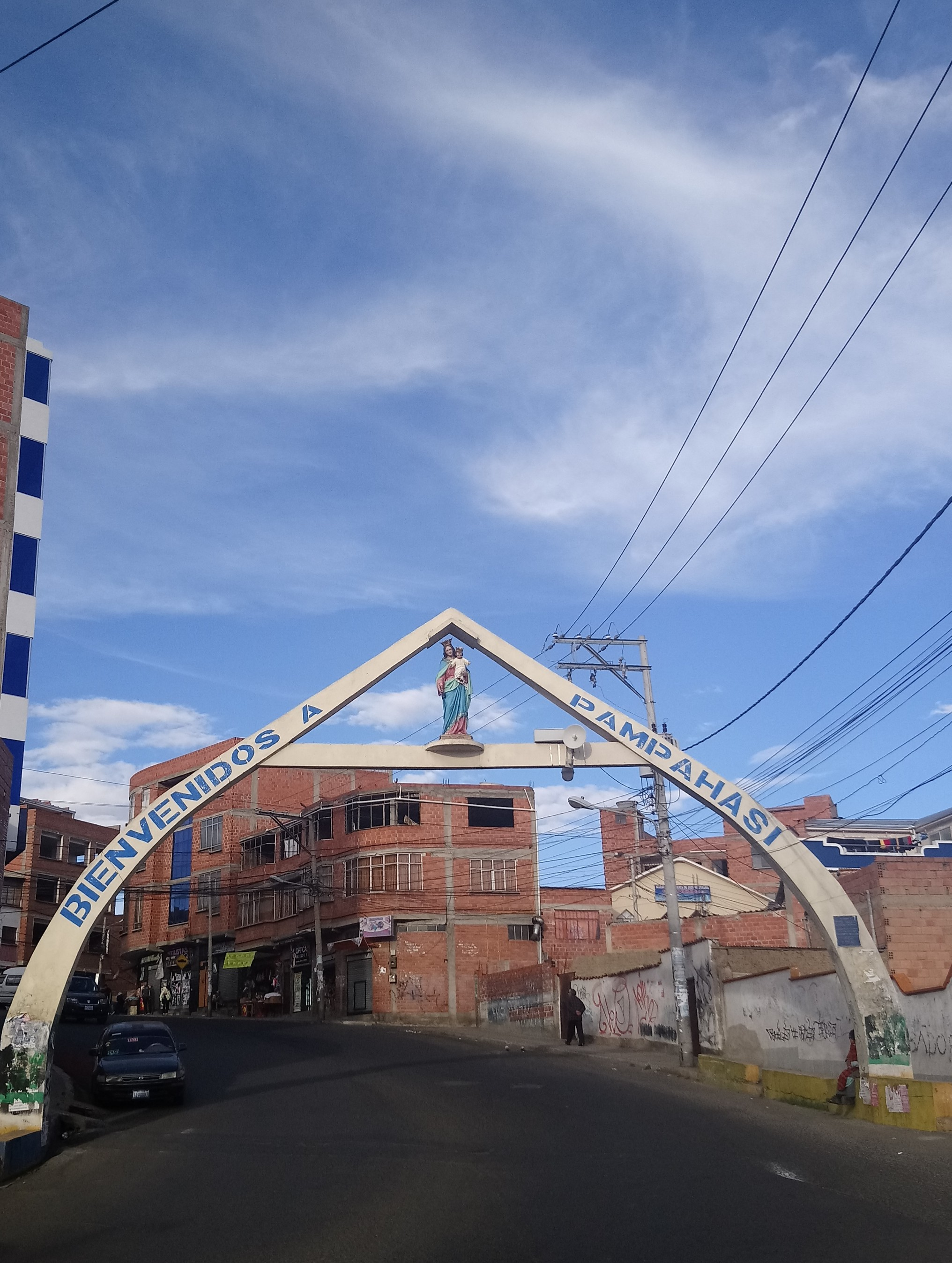 ARCO DE INGRESO A PAMPAHASI